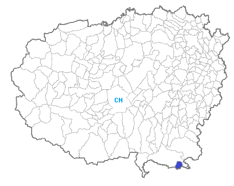 Posizione del comune nella provincia di Cuneo